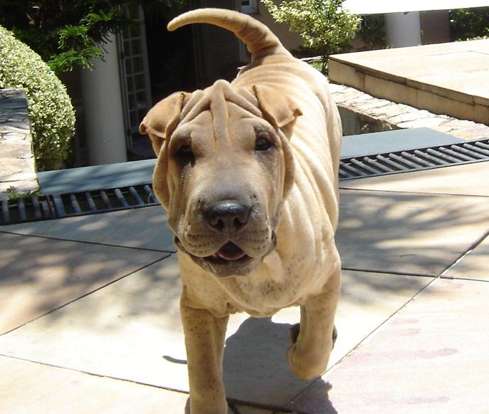 Foto de um Shar Pei fêmea